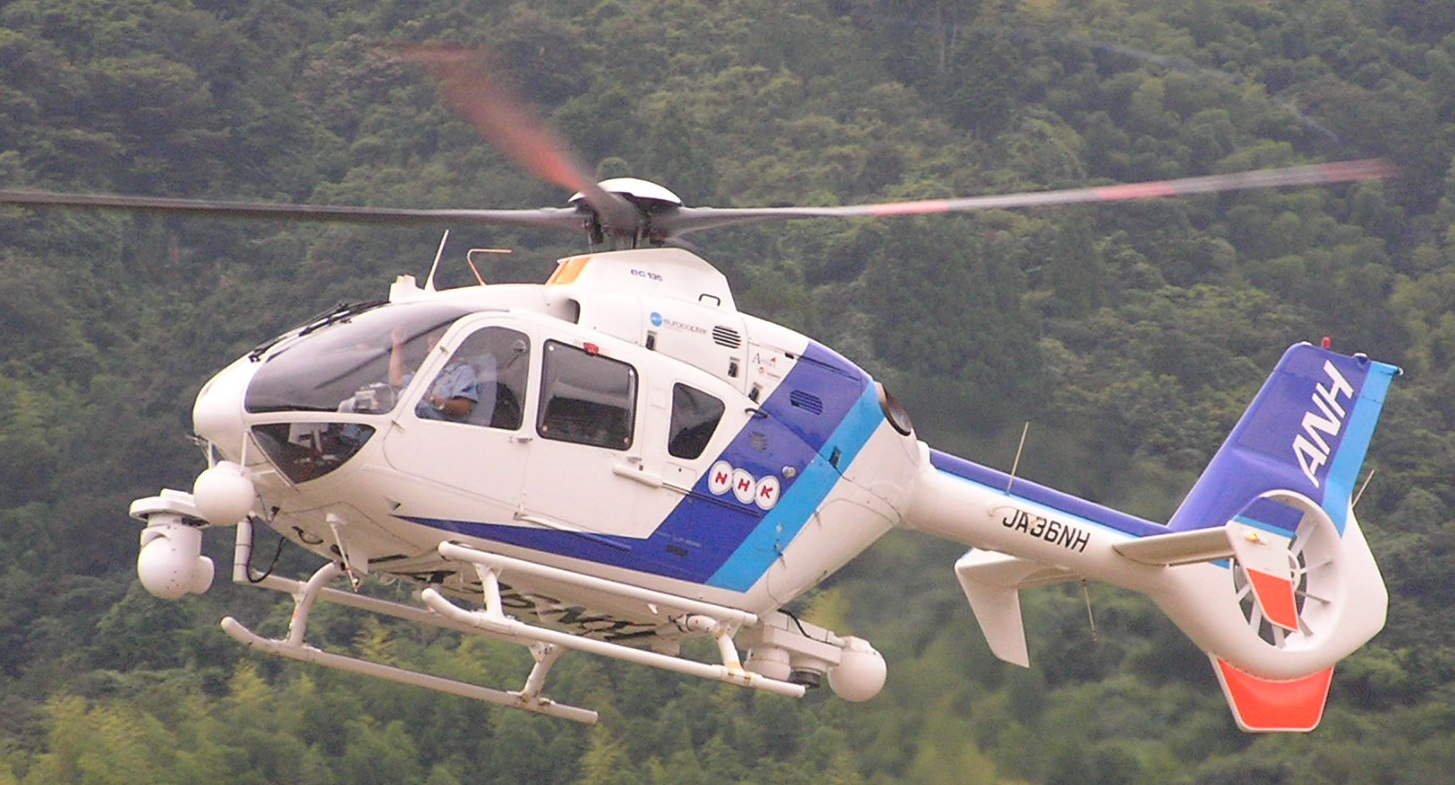 テレビ中継装置とスタビライザーカメラを搭載した、NHK取材ヘリ